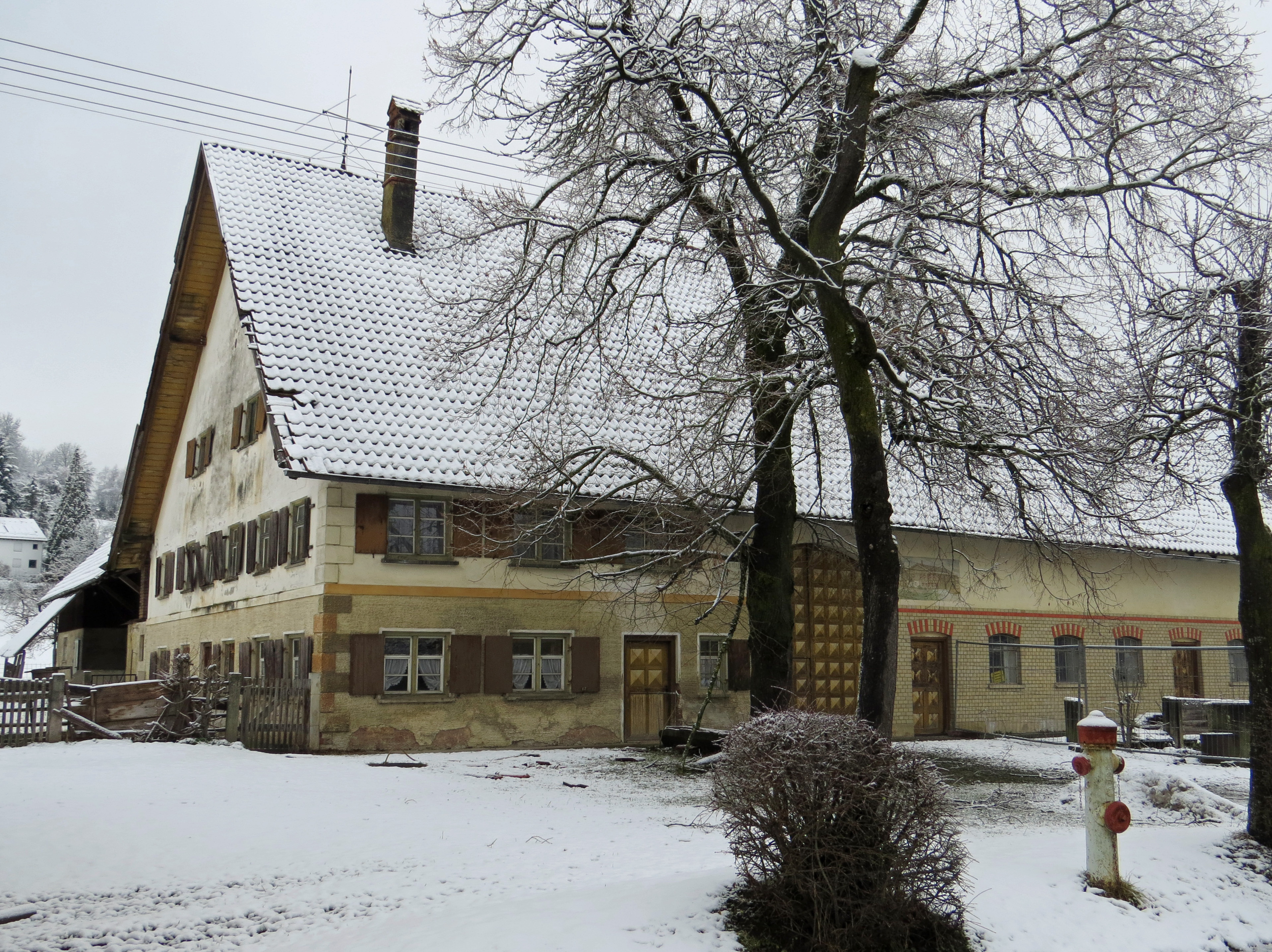 Kirchstr. 8 in Woringen